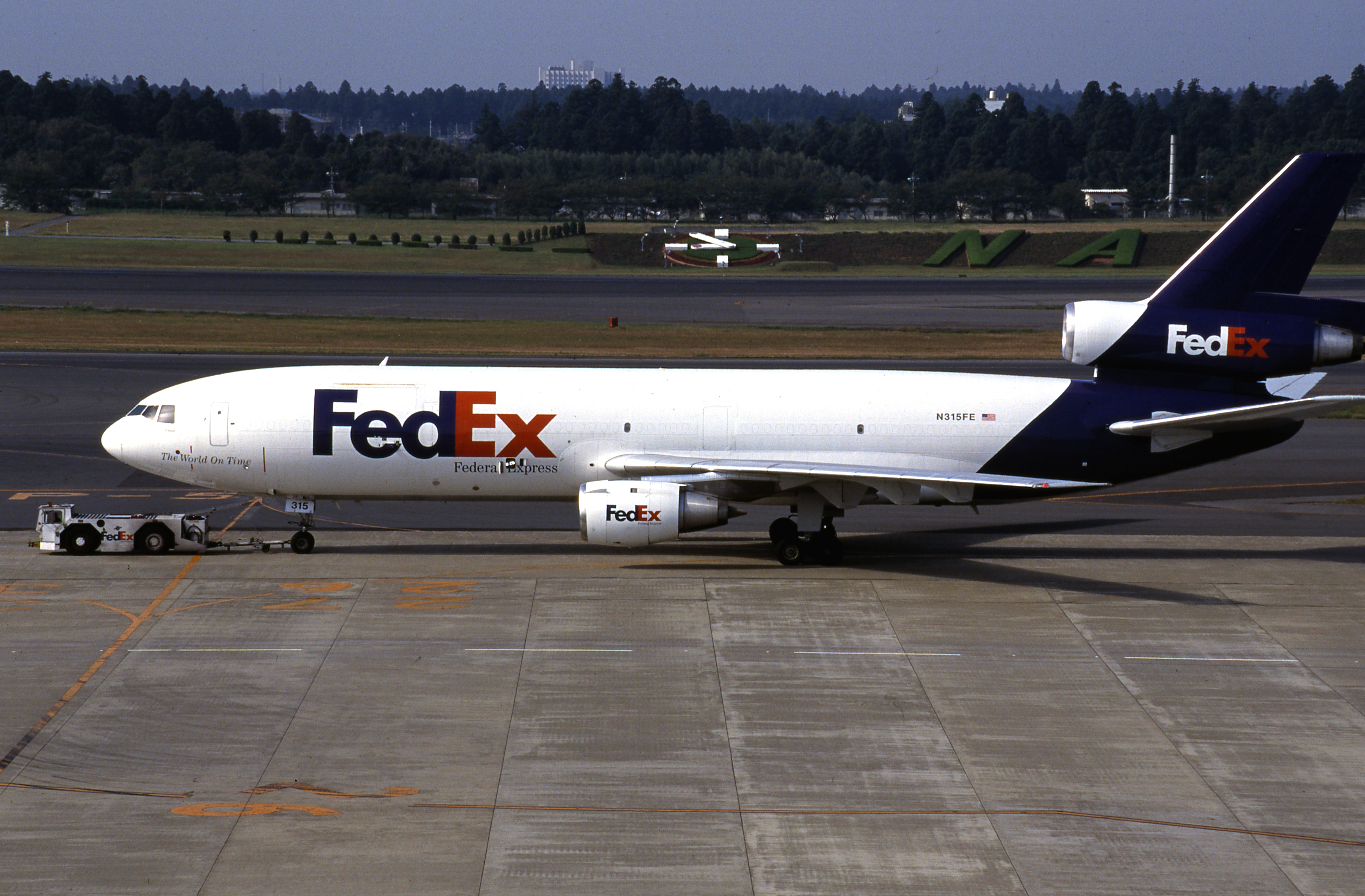 Federal Express DC-10-30F(AF)(N315FE/48313/443)